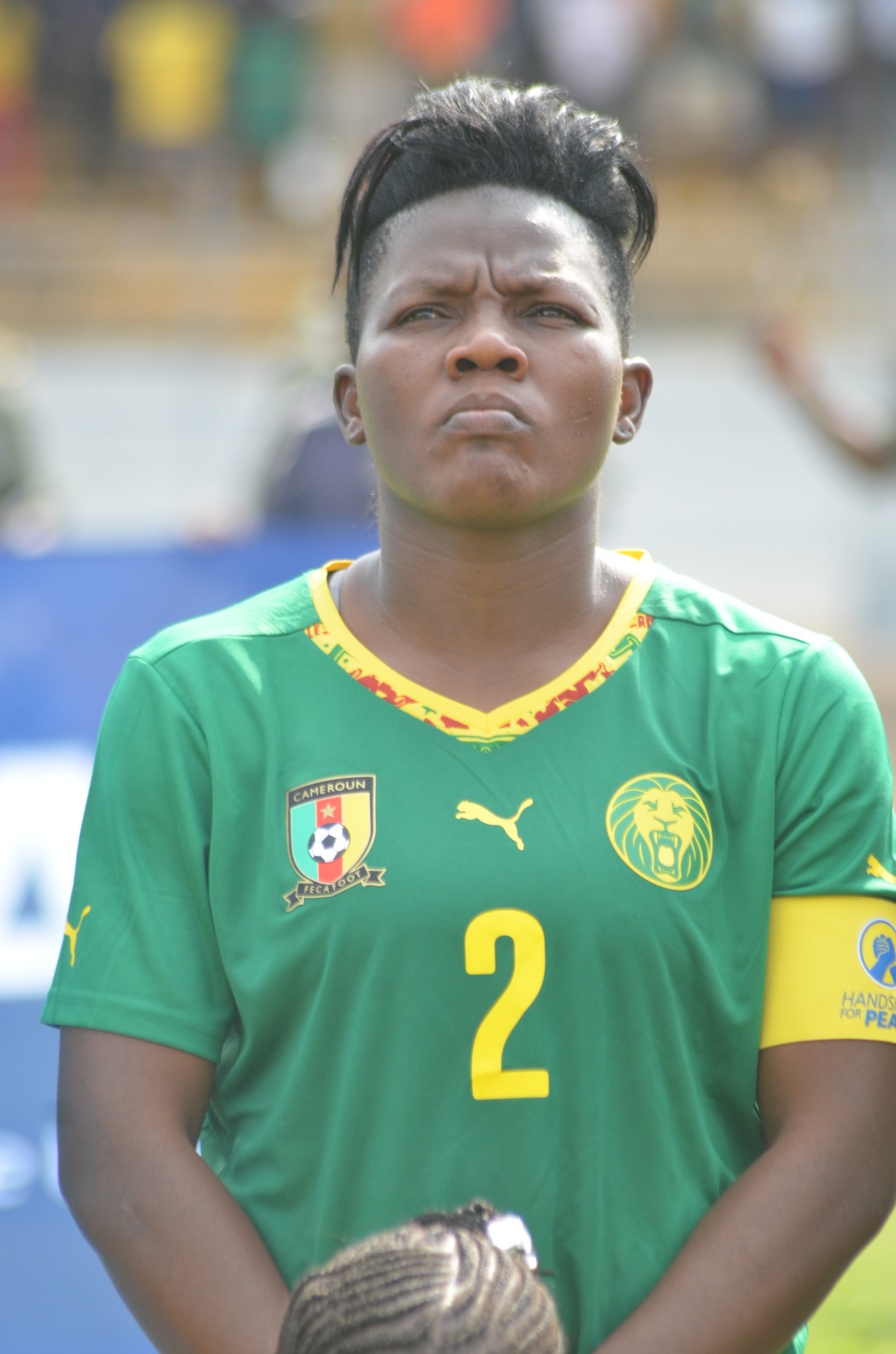 Défenseure de l'équipe nationale du Cameroun